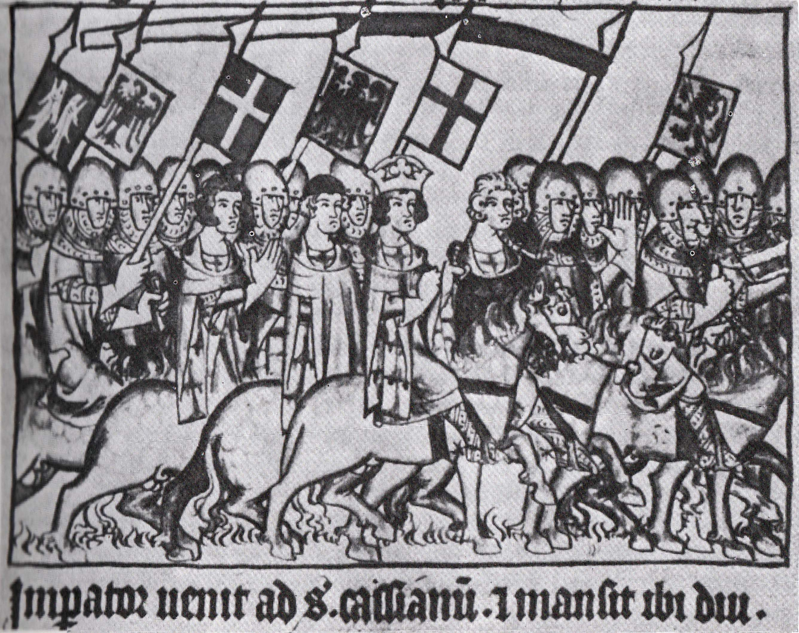 Ingresso dell'imperatore Arrigo VII a San Casciano